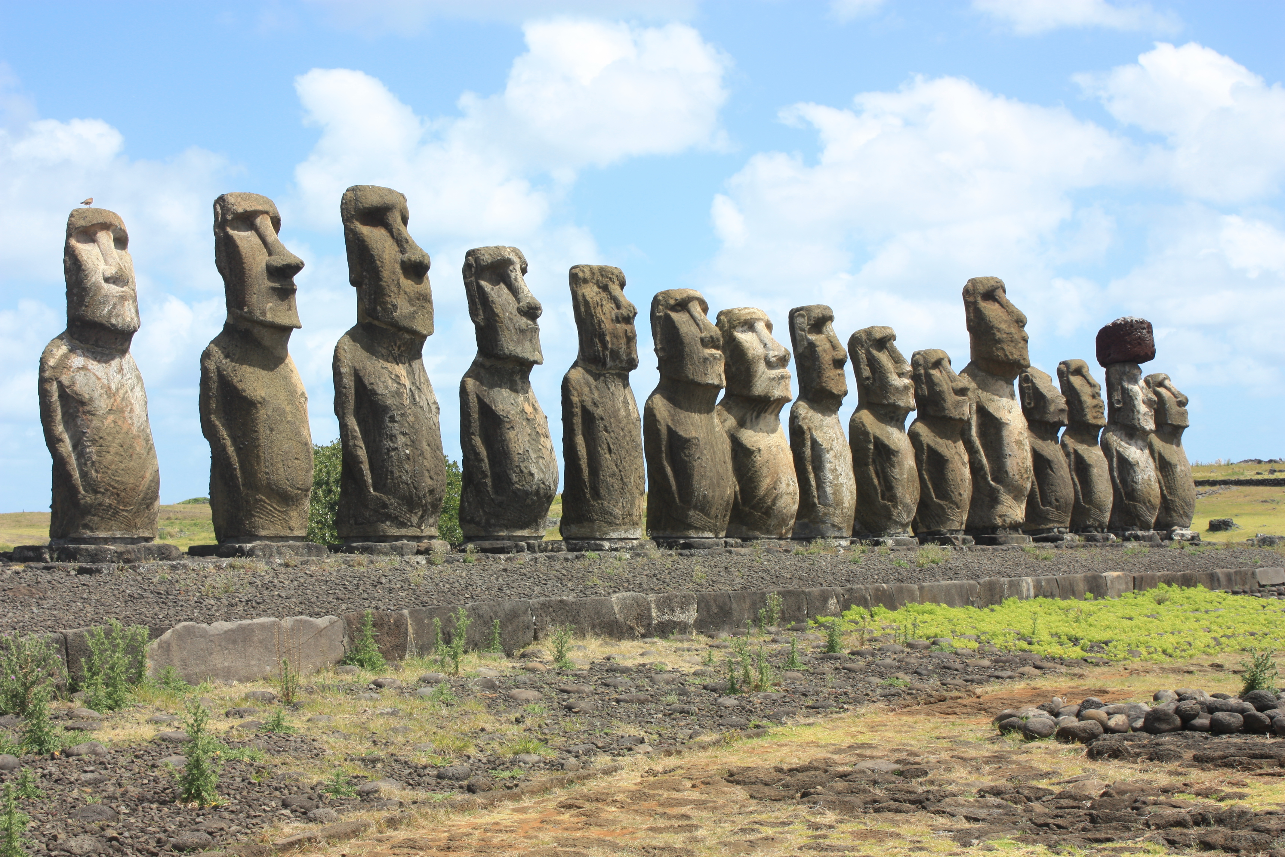 Easter Island, Ahu Tongariki